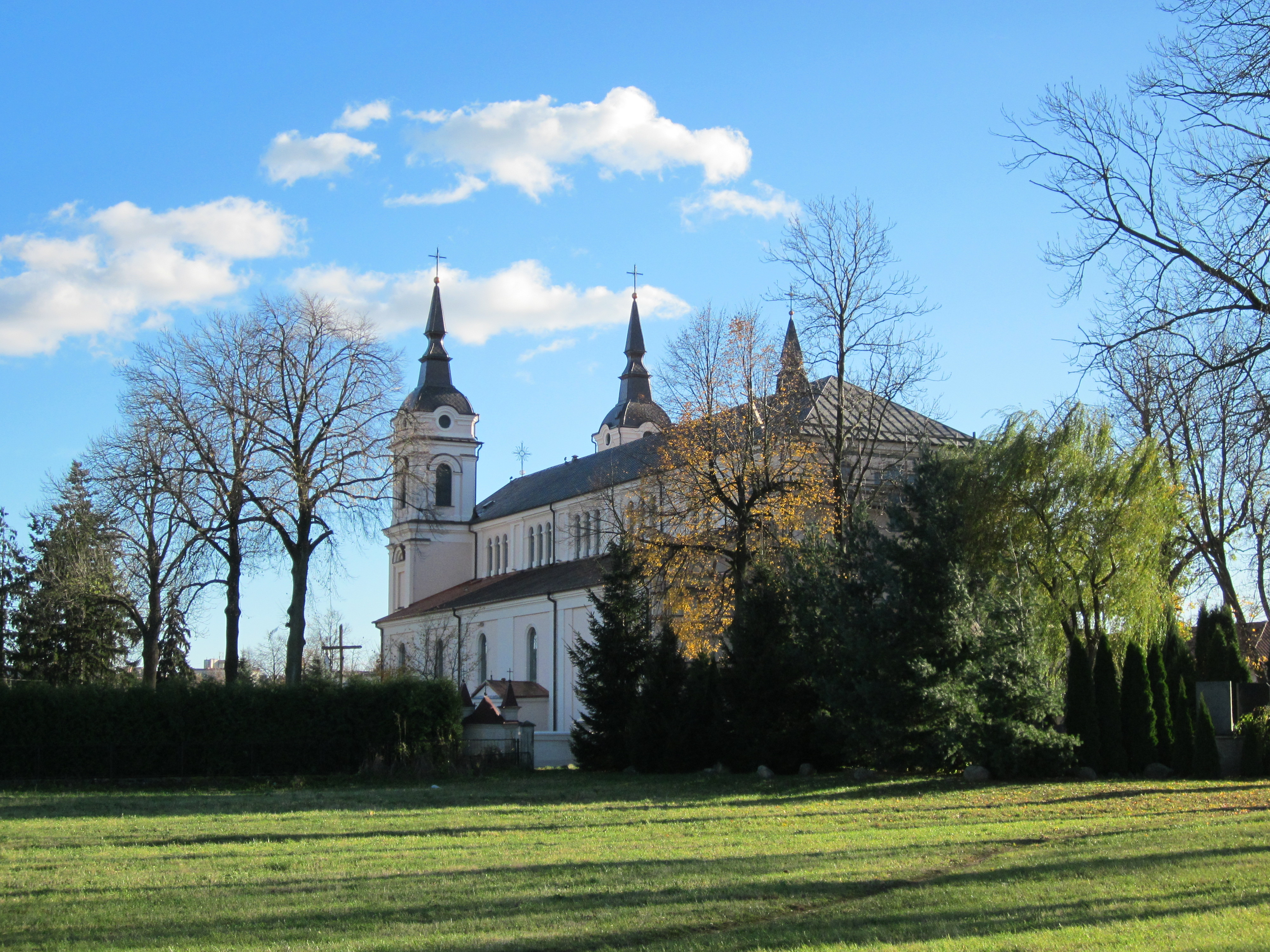 Kościół ten znajduje się przy ul. Kościelnej 2. Został obecnie odnowiony staraniem proboszcza ks. Ryszarda Niwińskiego. Z Tylu kościoła znajduje się cmentarz grzebalny. Wyznaczony 4 maja 1804 r., poświęcony 31 maja 1804 r.